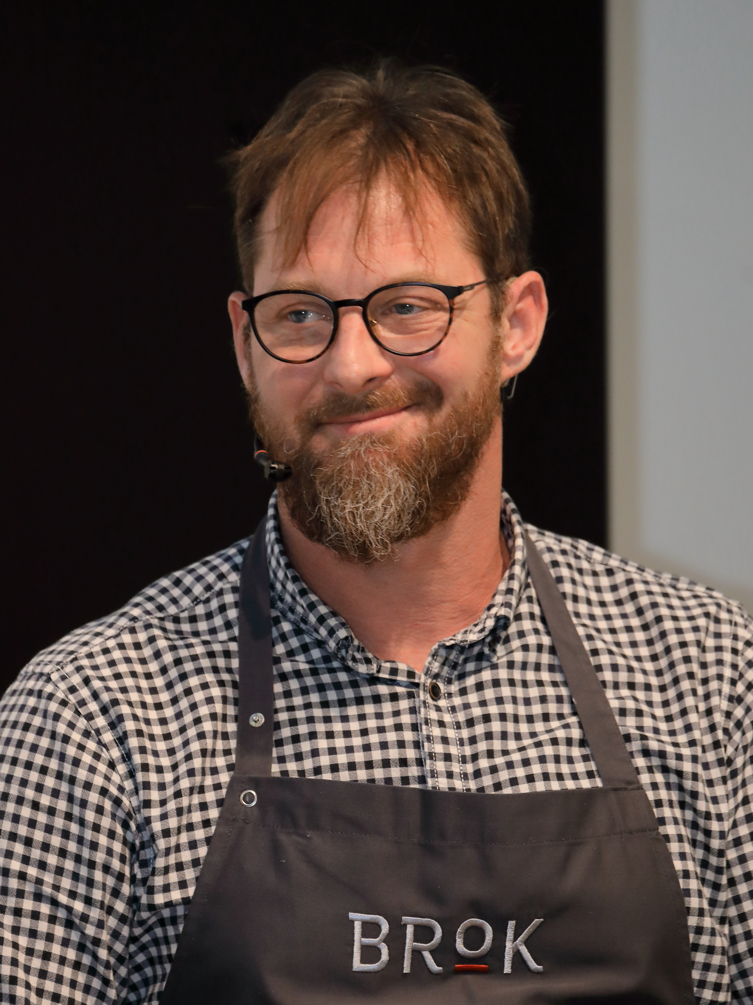 Der österreichische Koch und Kochbuchautor Bernie Rieder auf der Wiener Buchmesse 2019.